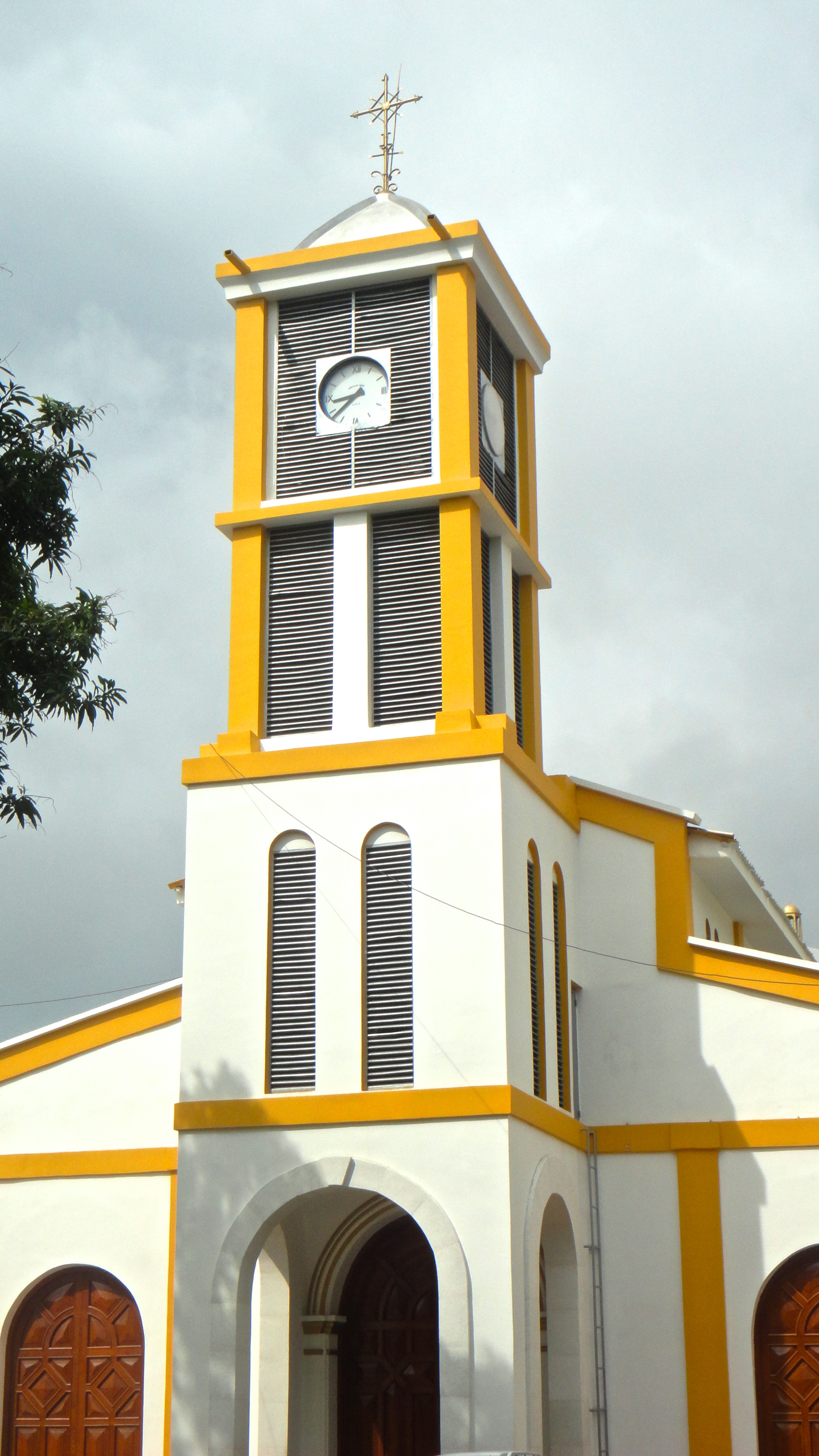 Ubicación: ARAUCA, ARAUCA